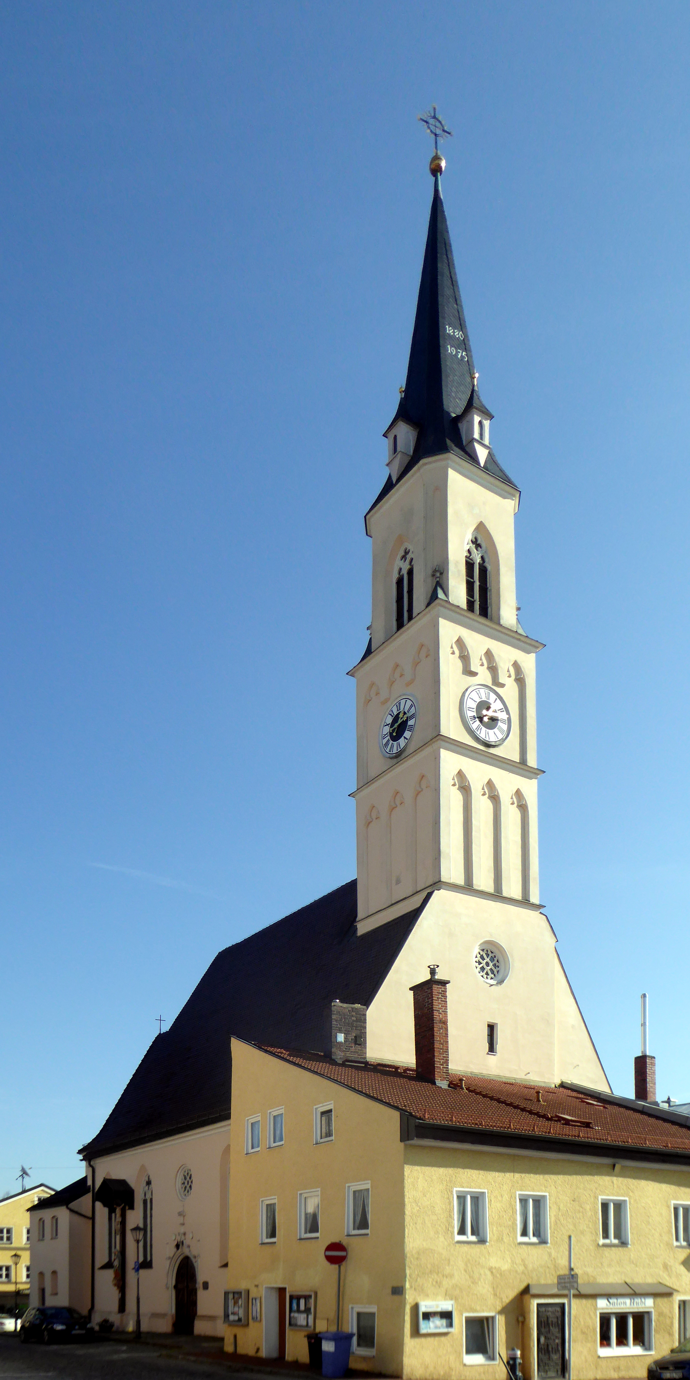 Neumarkt-Sankt Veit, Kirche Johannes Baptist von Westen gesehen.